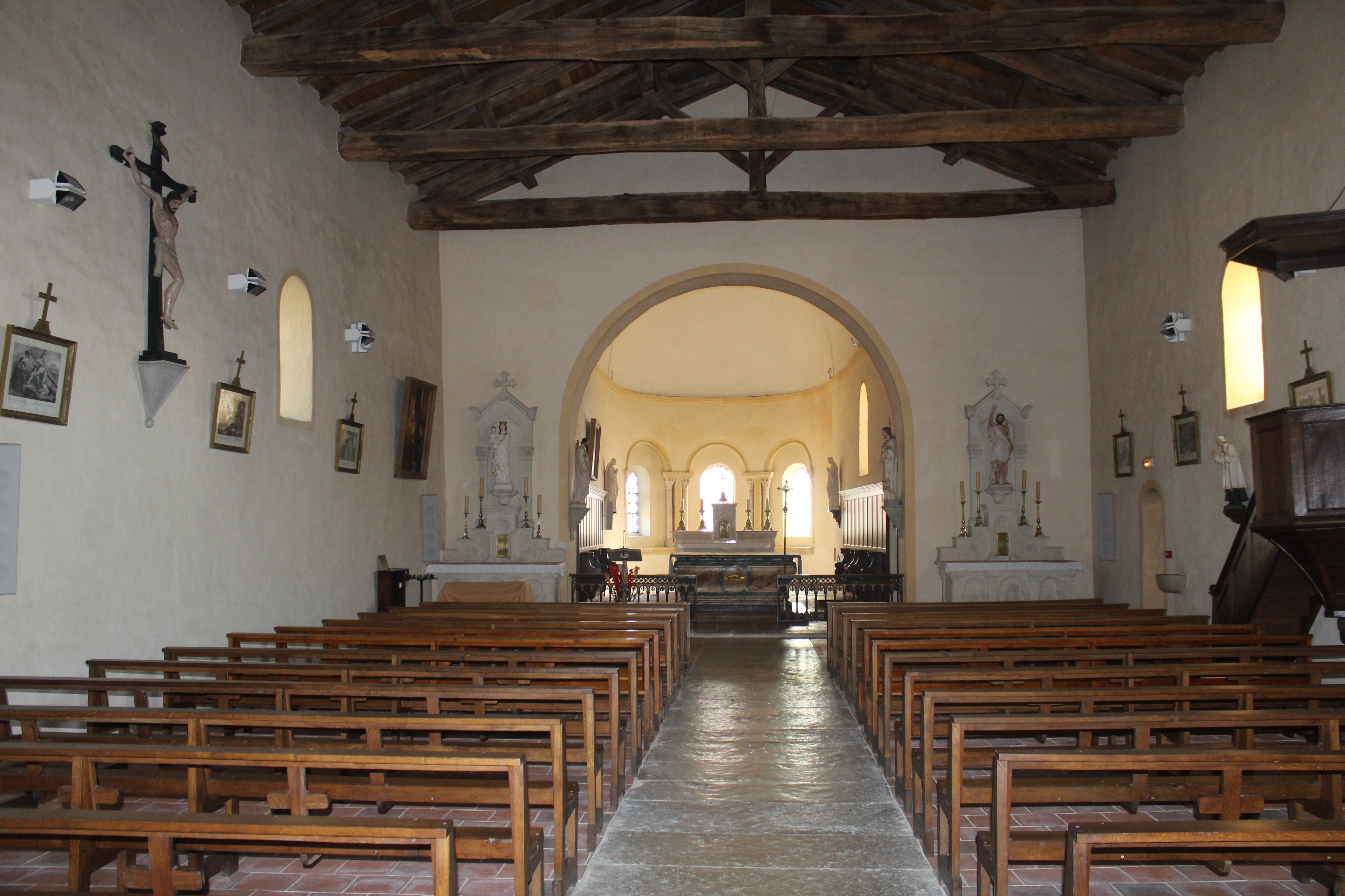 Église Saint-Jean-Baptiste de Chaveyriat.